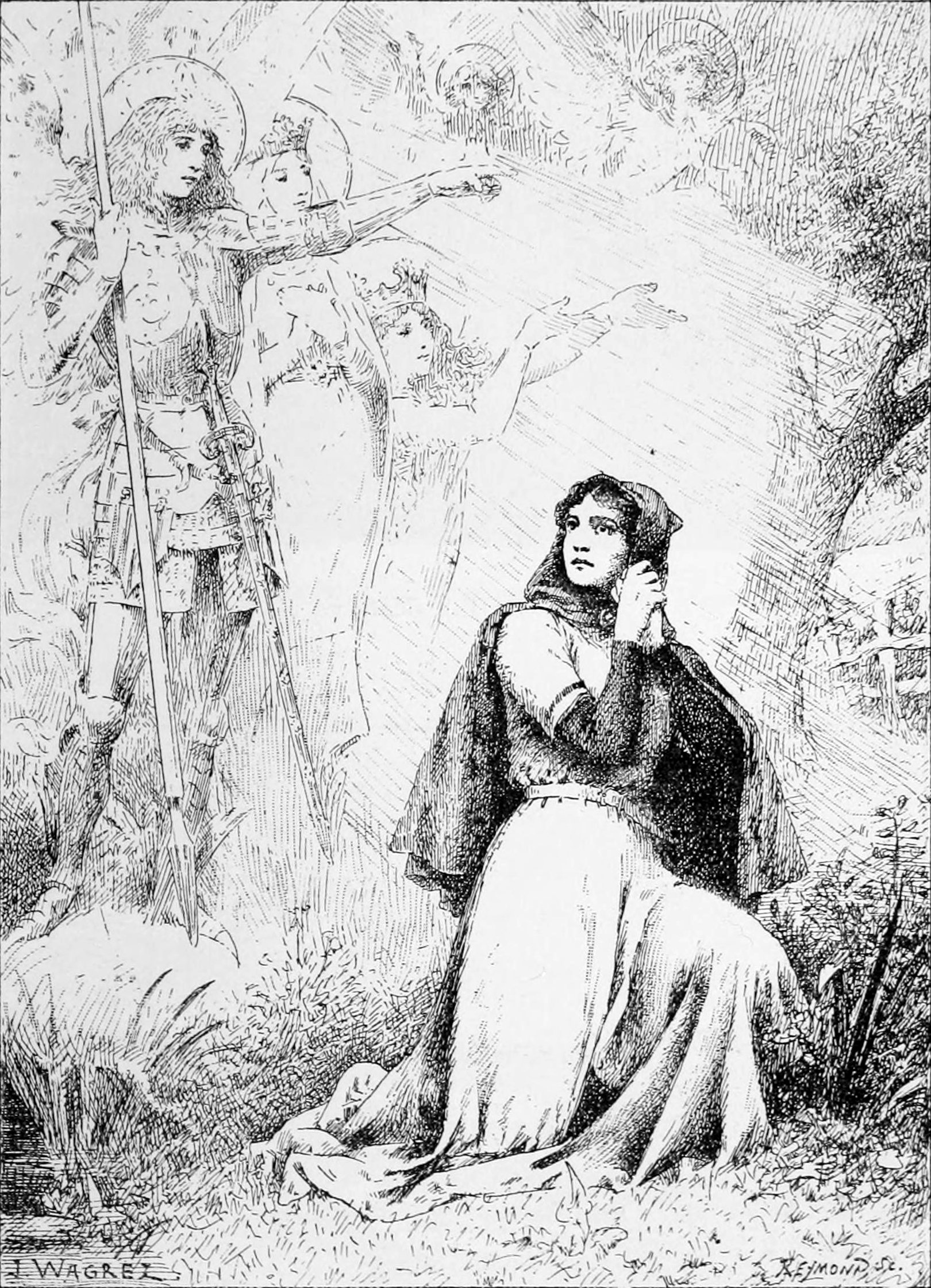 Les Voix de Jeanne d'Arc